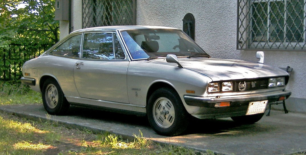 Isuzu-117Coupe 1800XＧ